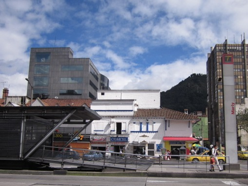 Estación Marly de Transmilenio.